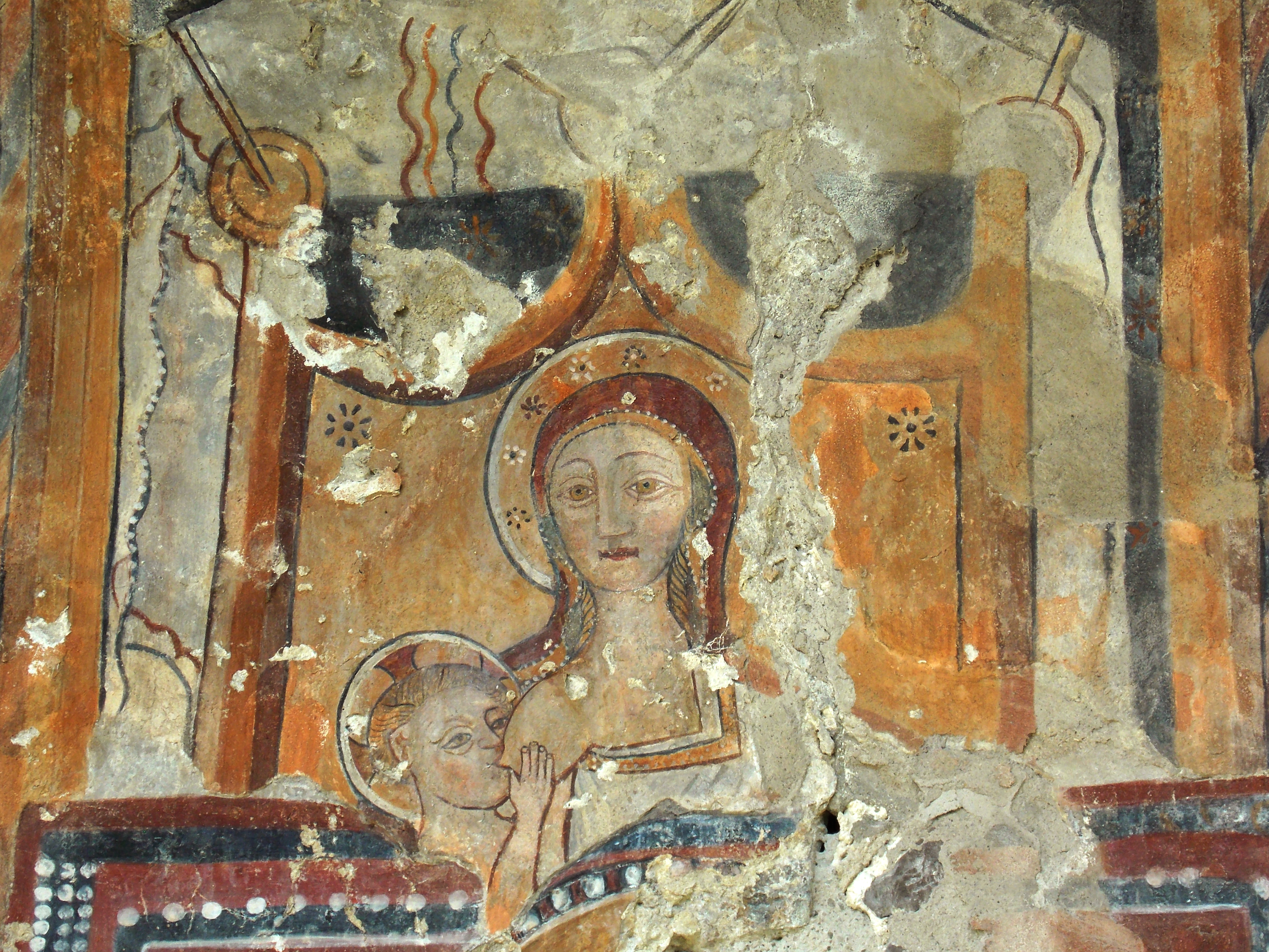 I ruderi dell'abside dell'oratorio di San Giorgio a Faicchio (BN) con gli affreschi, dipinti fra il X e il XV secolo